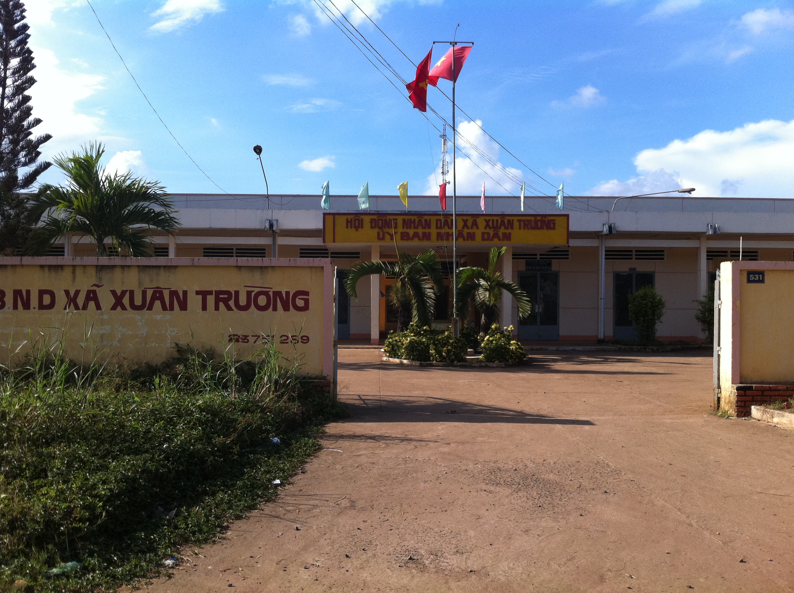 UBND xã Xuân Trường, Xuân Lộc, Đồng Nai